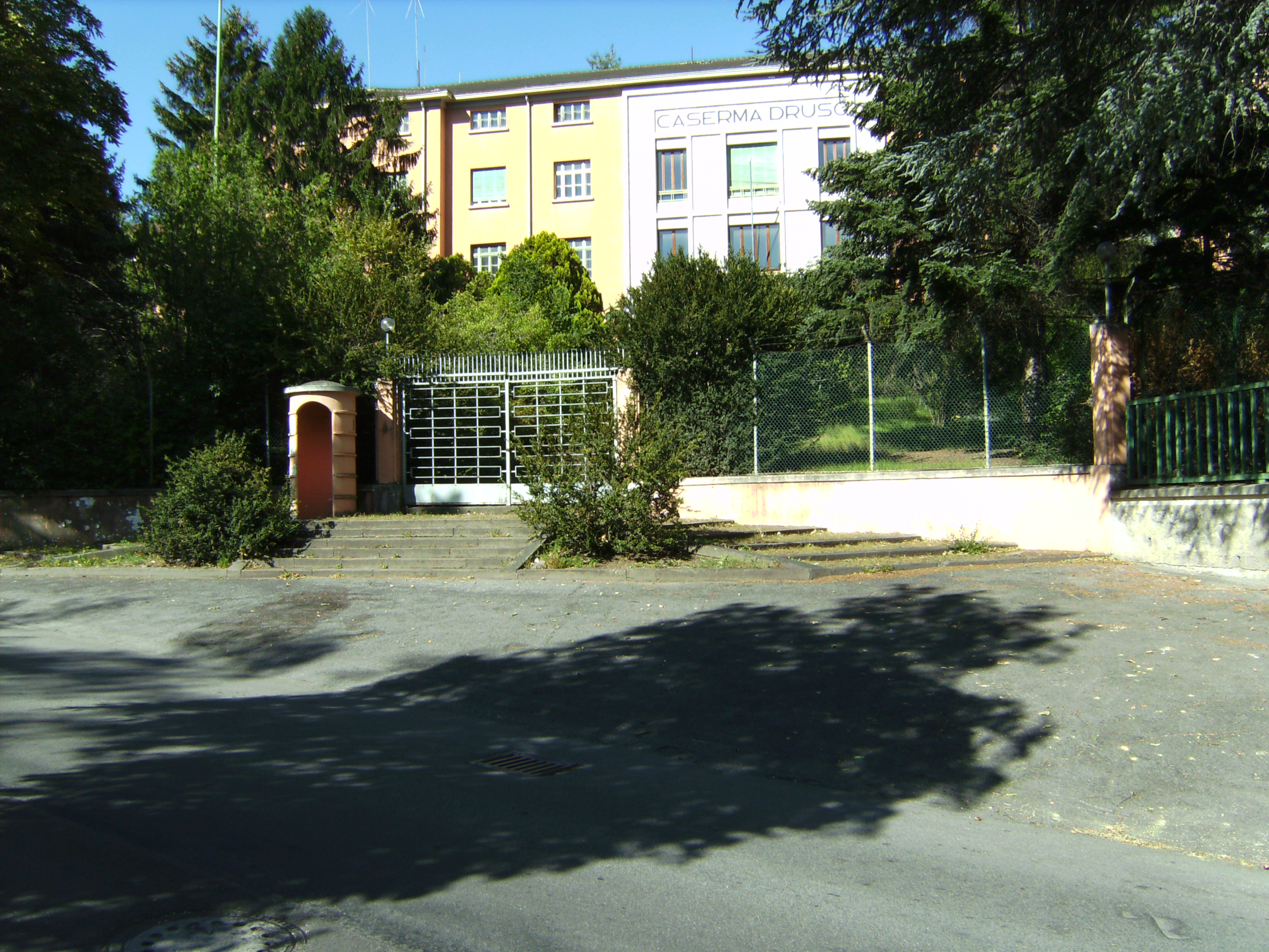 Caserma Druso in Schlanders (vormals k.u.k. 28er Kaserne)